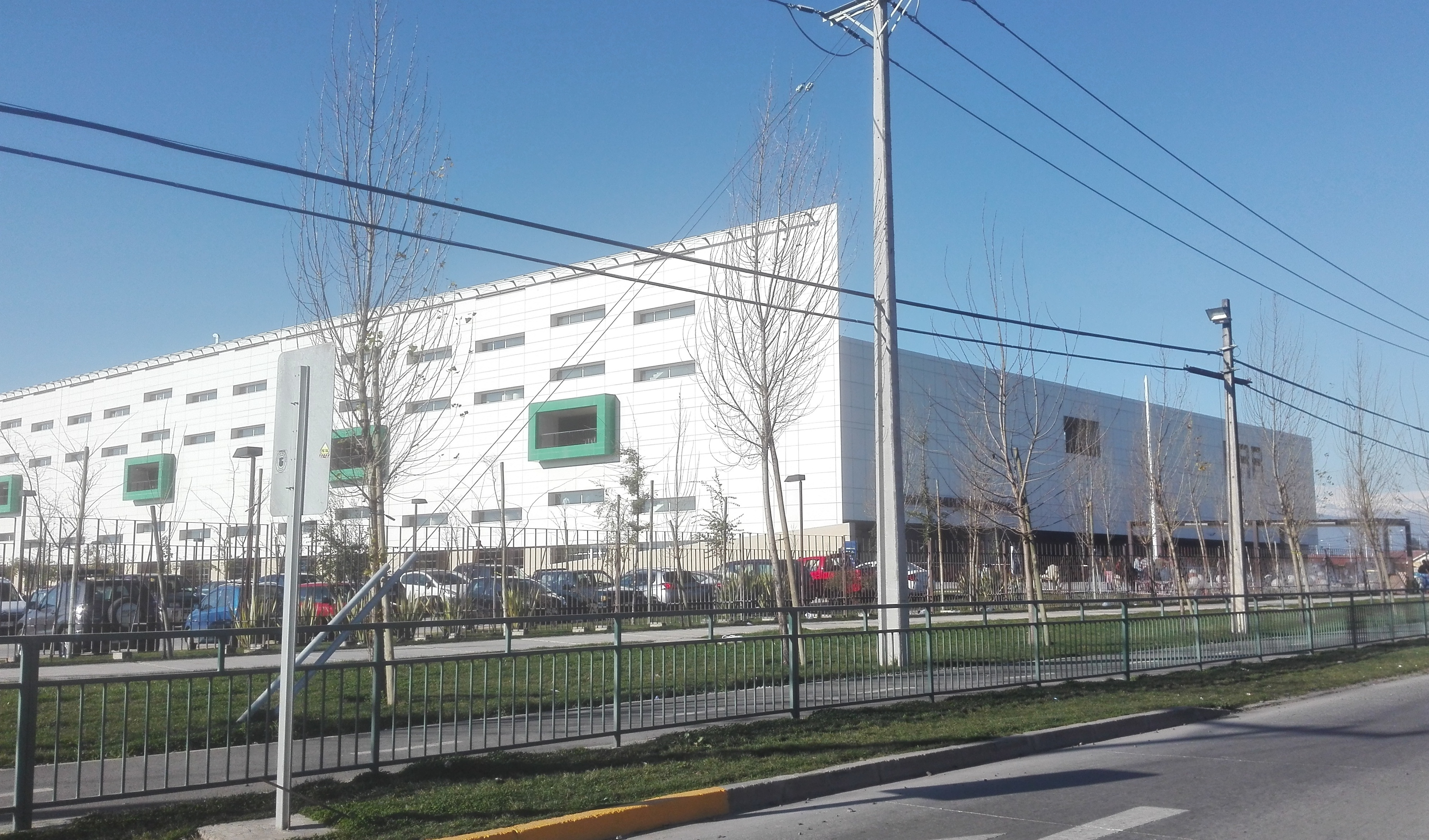 Hospital Regional Rancagua, Chile.